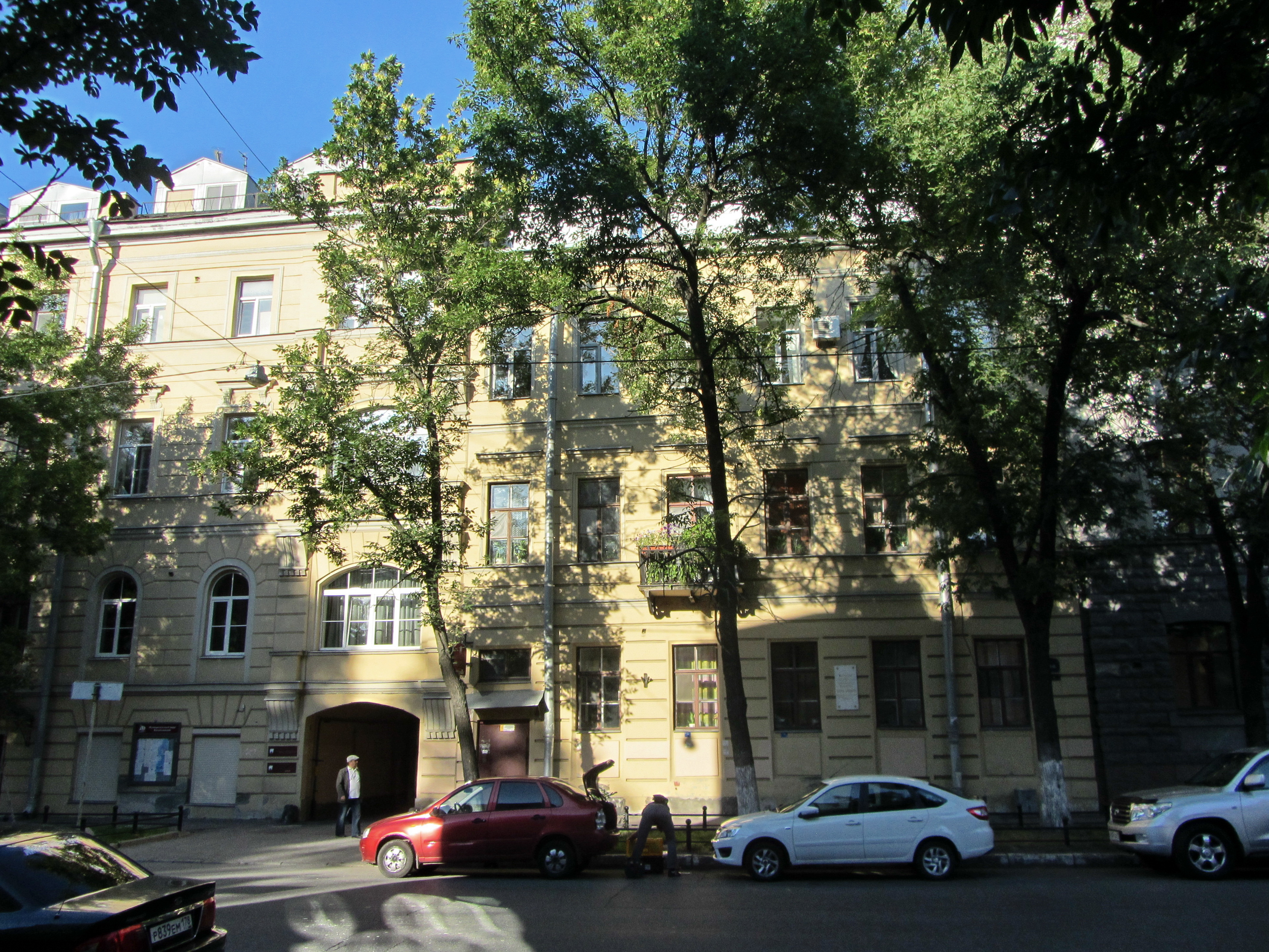 Беларуская (тарашкевіца): Дом нумар 45 на 4-й лініі Васільеўскага вострава, Санкт Пецярбург. Тут месьцілася шасьціпакаёвая кватэра беларускага навукоўца Браніслава Эпімаха-Шыпілы, у ёй у Пецярбурскі пэрыяд жыў паэт Янка Купала, месьцілася рэдакцыя выдавецтва Загляне сонца і ў наша аконца. На доме месьціцца памятная дошка аб тым, што тут жыў Янка Купала.